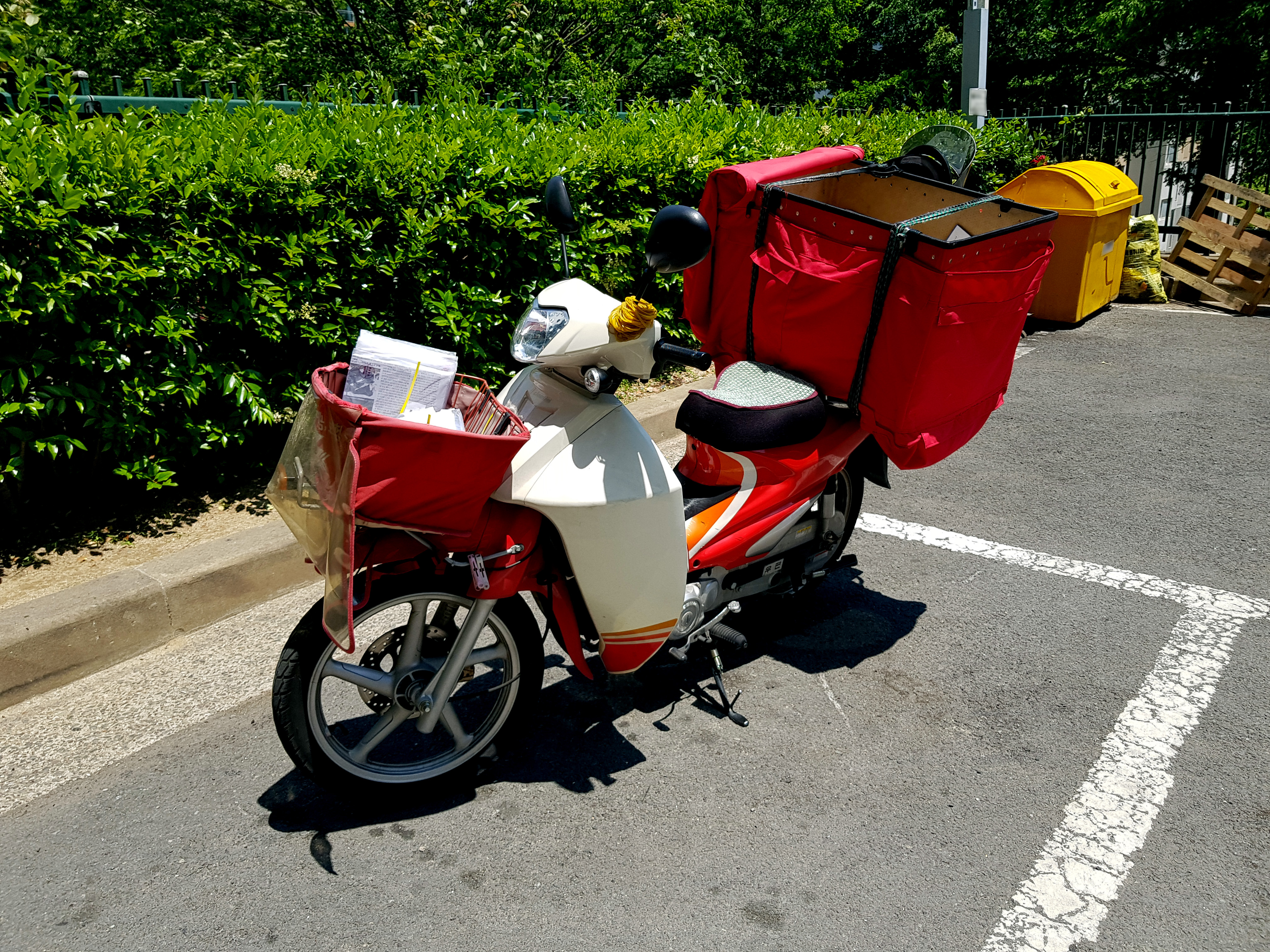 집배 오토바이(대림 시티100)